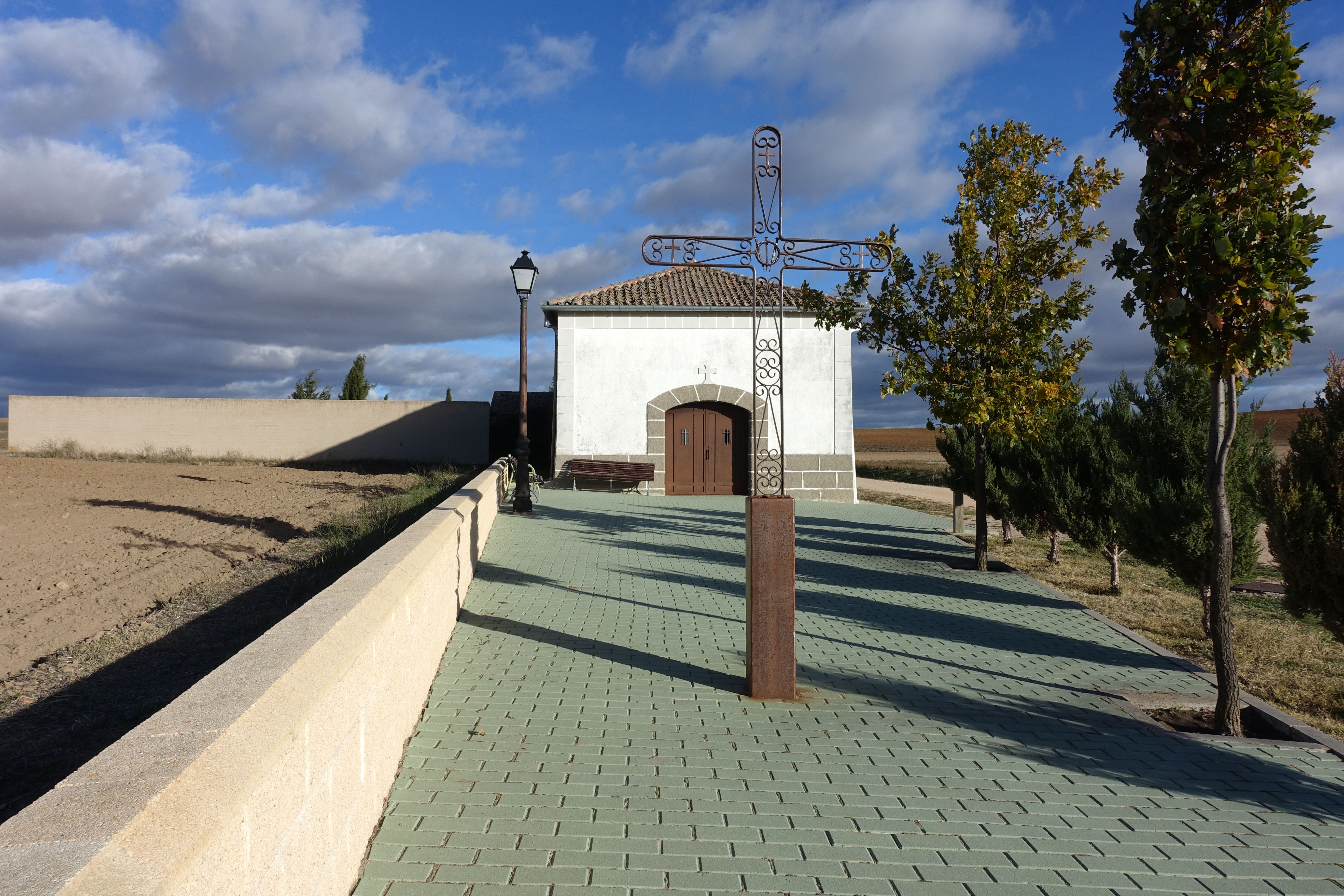 Ermita del Santo Cristo de los Afligidos, en Añe (Segovia, España).